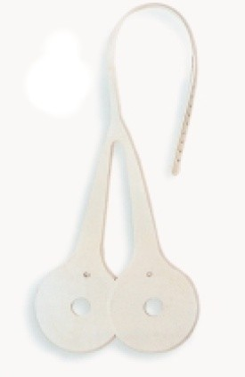 Australian Cheekers